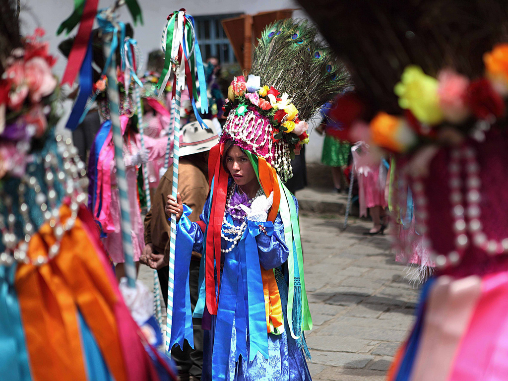 Bailarina de Anti en la fiesta patronal de Chacas